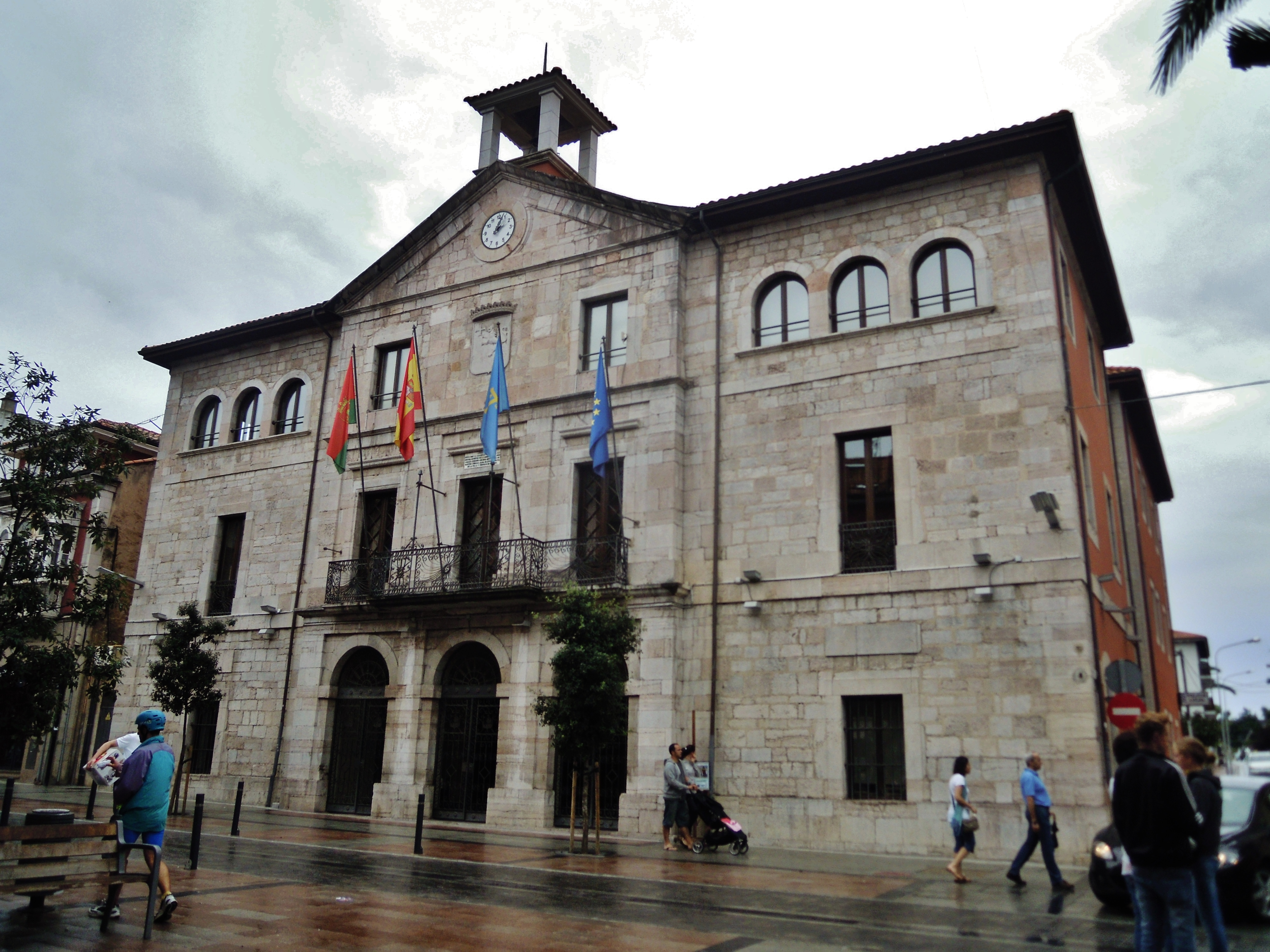 Casa conceyu Llanes